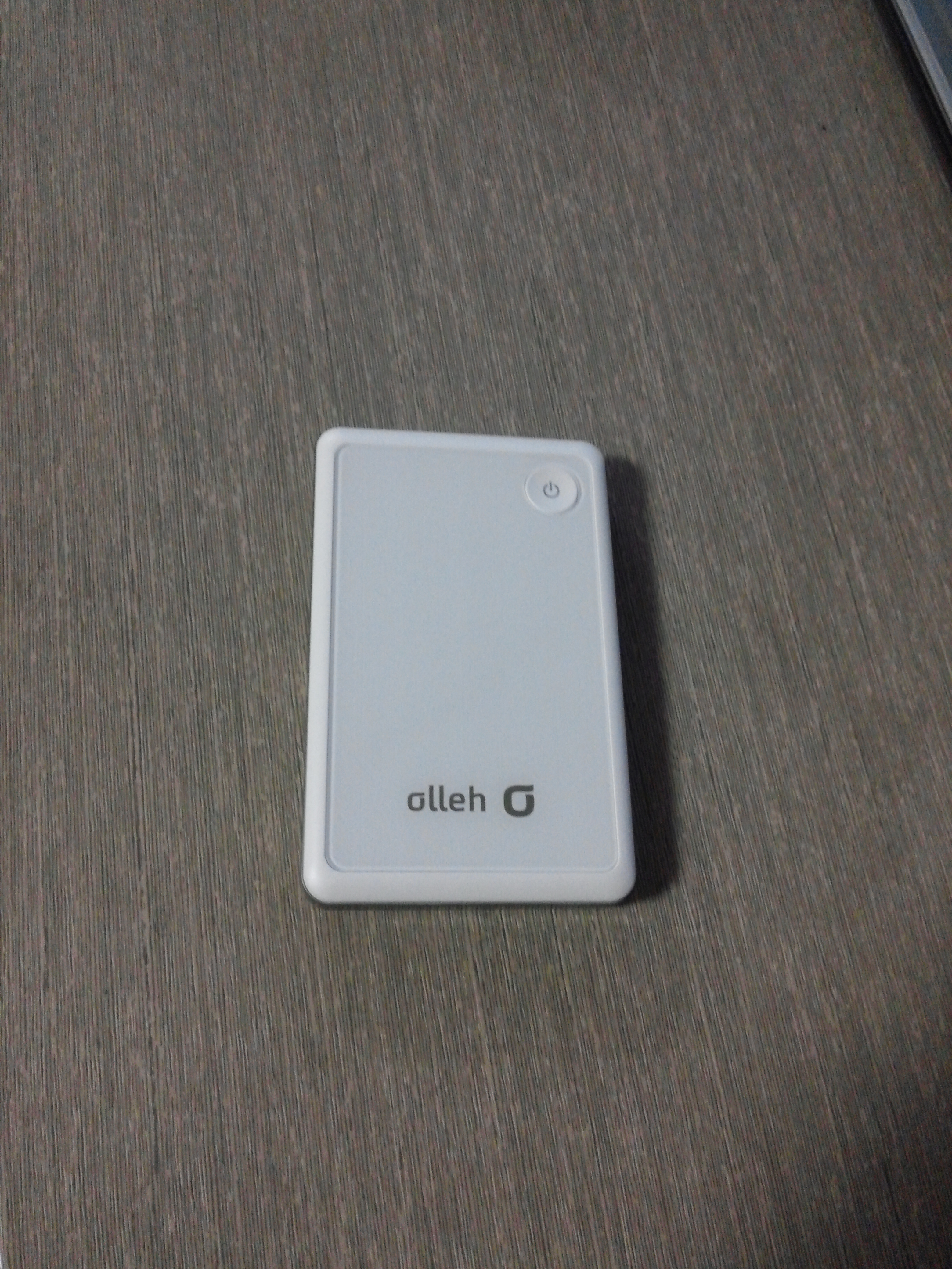 스트롱에그2